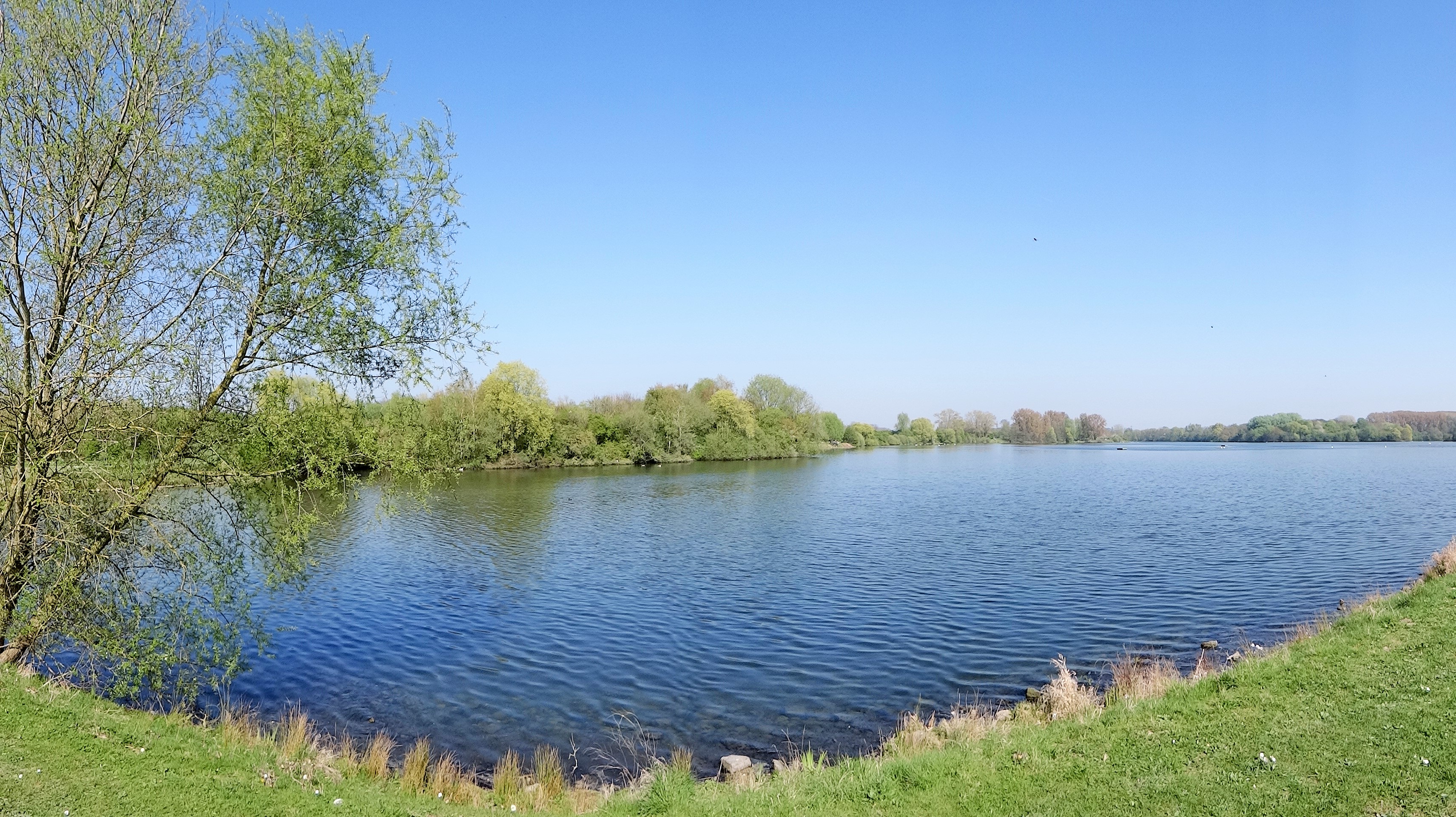 Lac du Héron